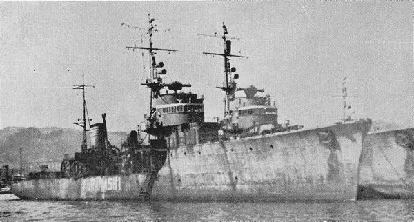 復員庁特別輸送艦『倉橋』（左）と同『屋代』、横須賀港内